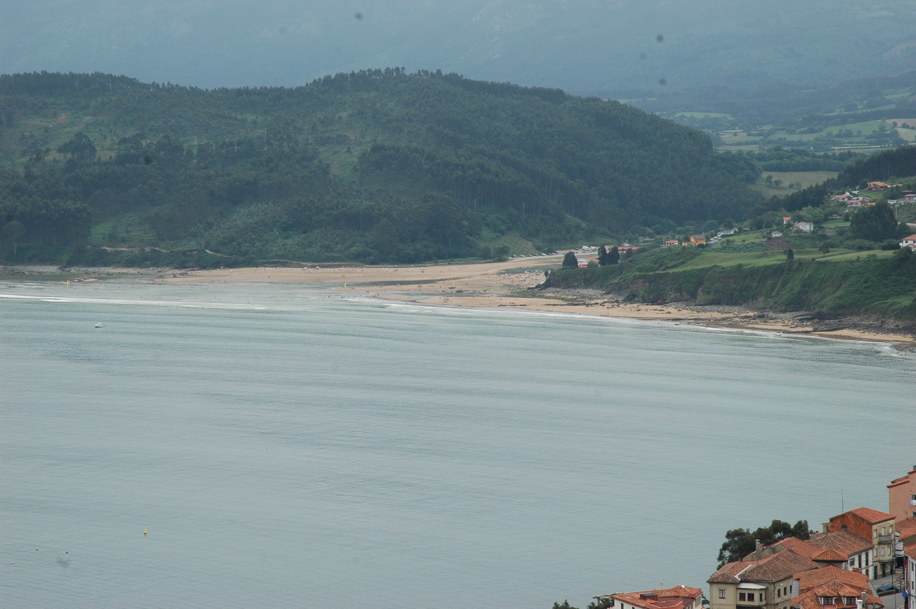 Desembocadura del ríu Lliberdón na playa de La Griega (San Xuan de la Duz, Colunga, Asturies).